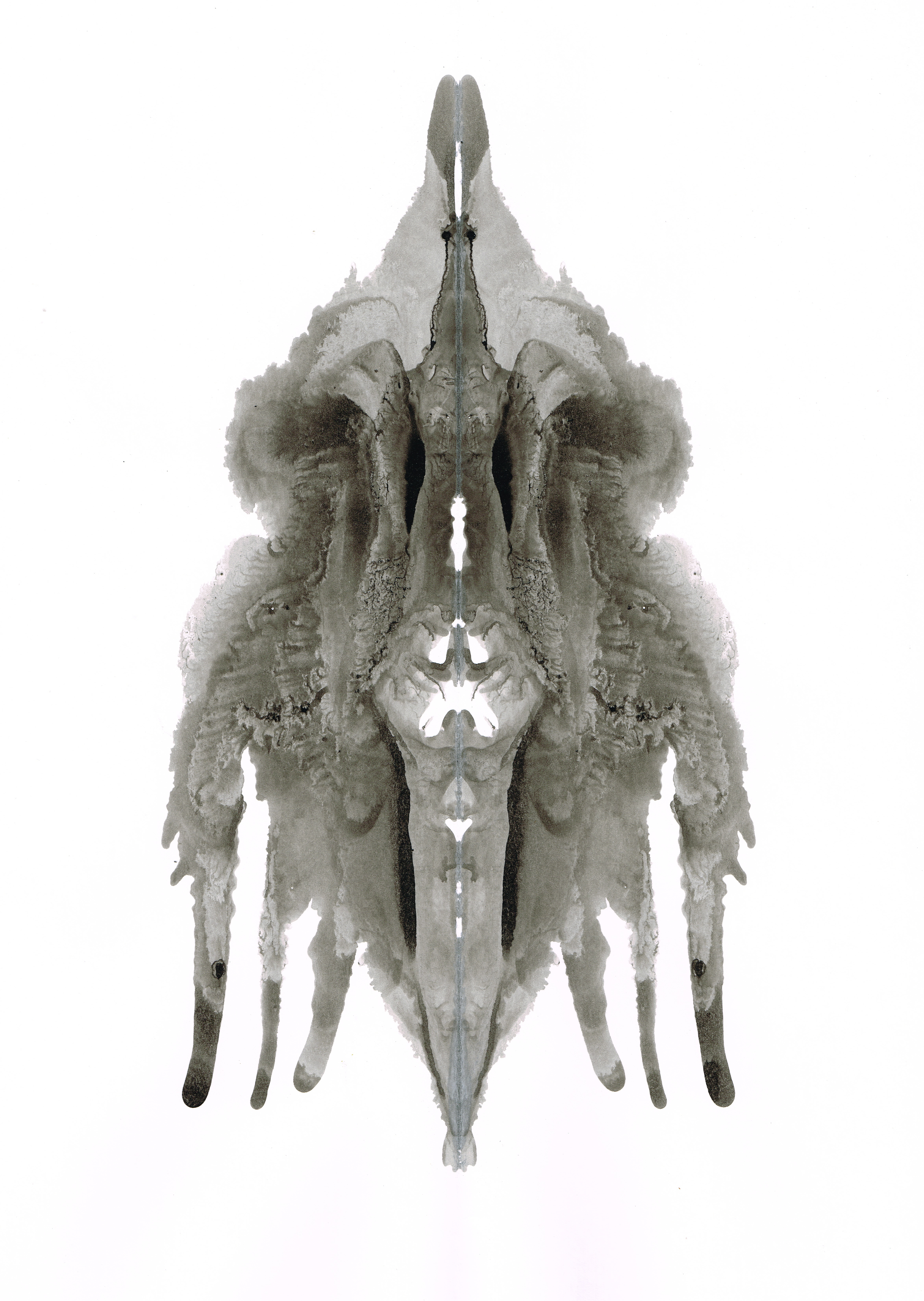 Faltbild, gefertigt mit japanischer Tinte auf Papier von Künstlerin J. Sophia Sanner